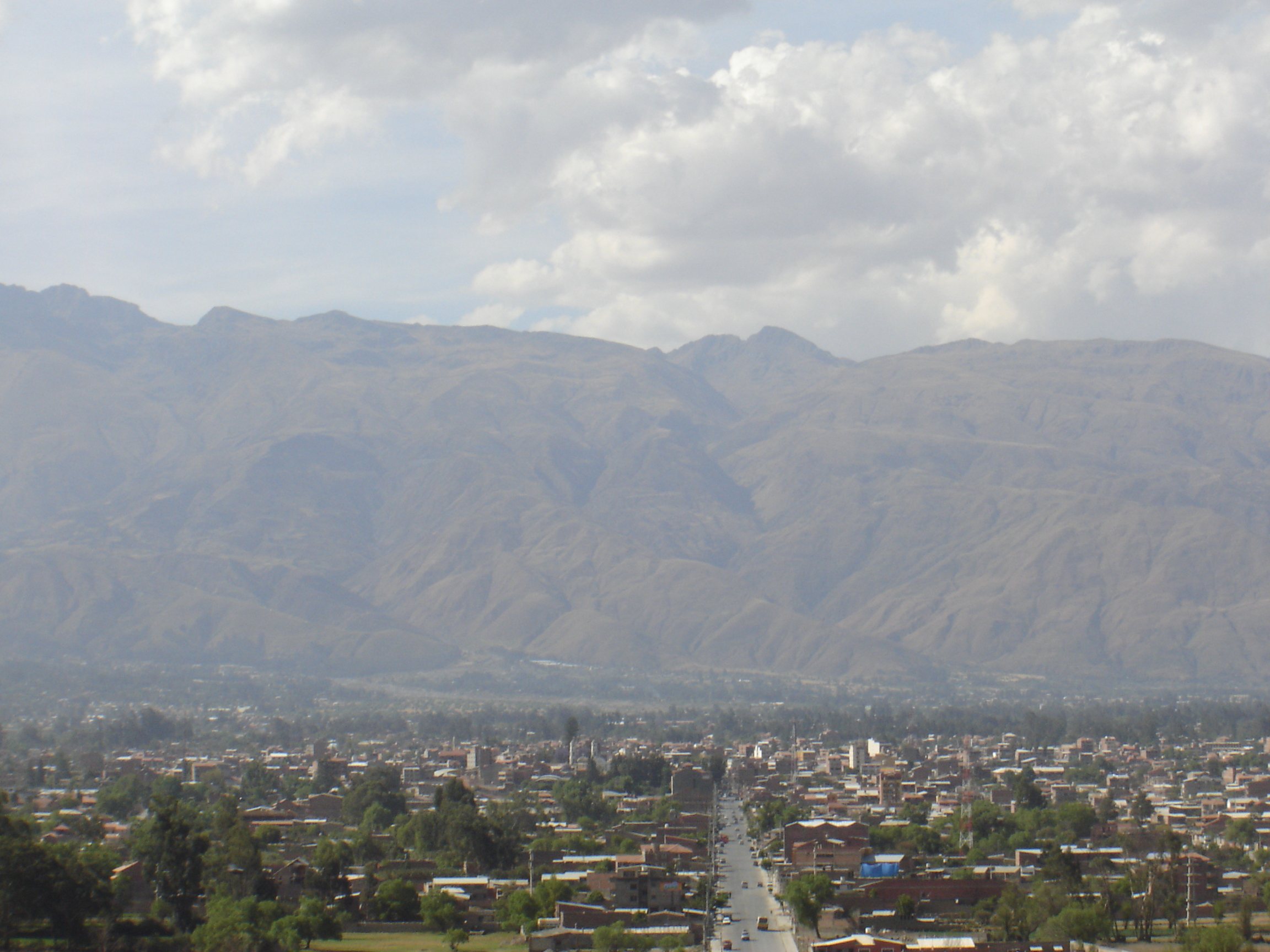 Una vista panorámica de la ciudad de Quillacollo desde el Calvario de la Virgen María de Urqupiña Runa Simi: Juq qhawariy Killaqullu llaqtata Urqupiñamanta Llump'aq Mariyaq Kalwariunmantapacha.